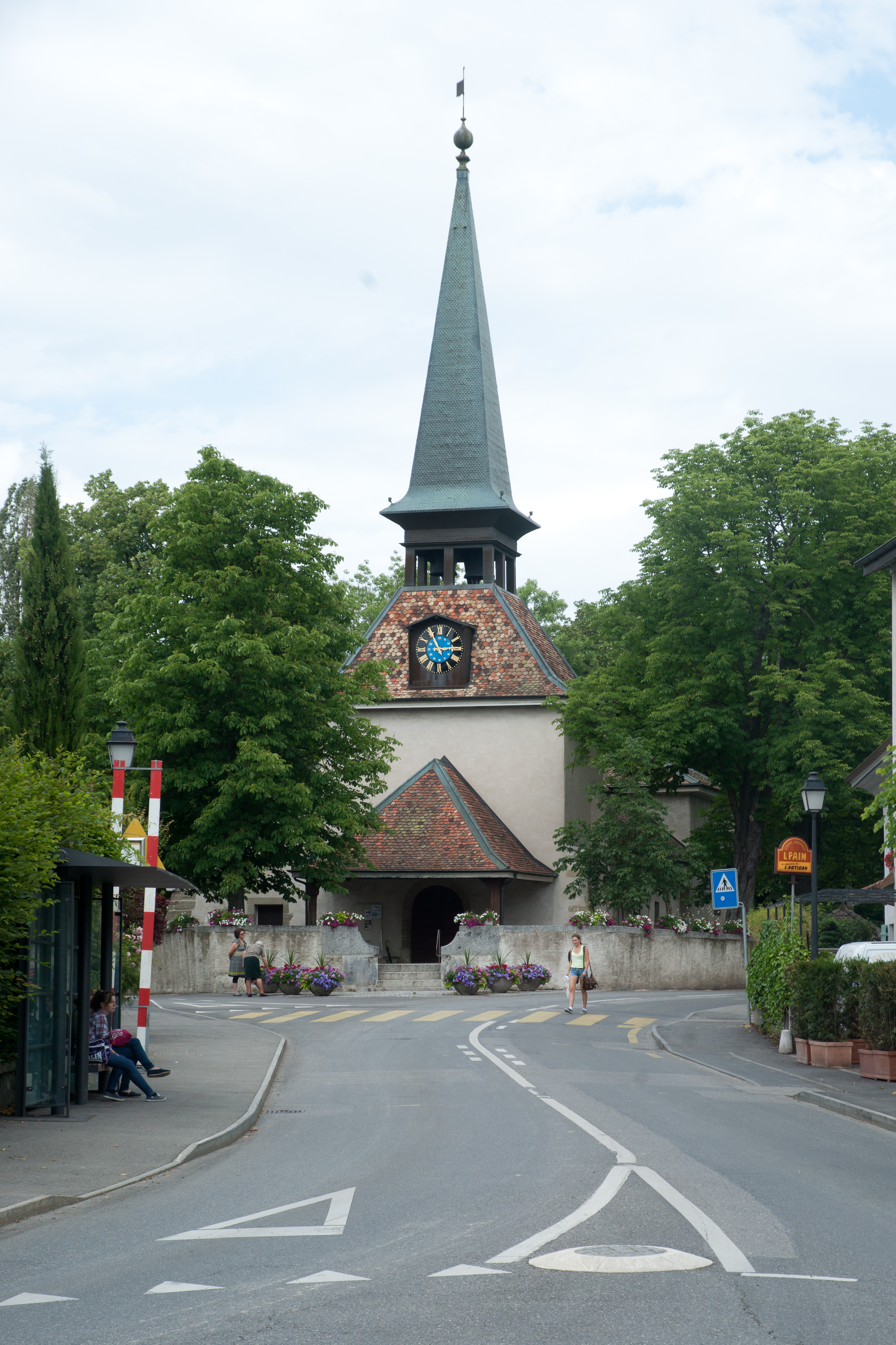 Église de Jussy